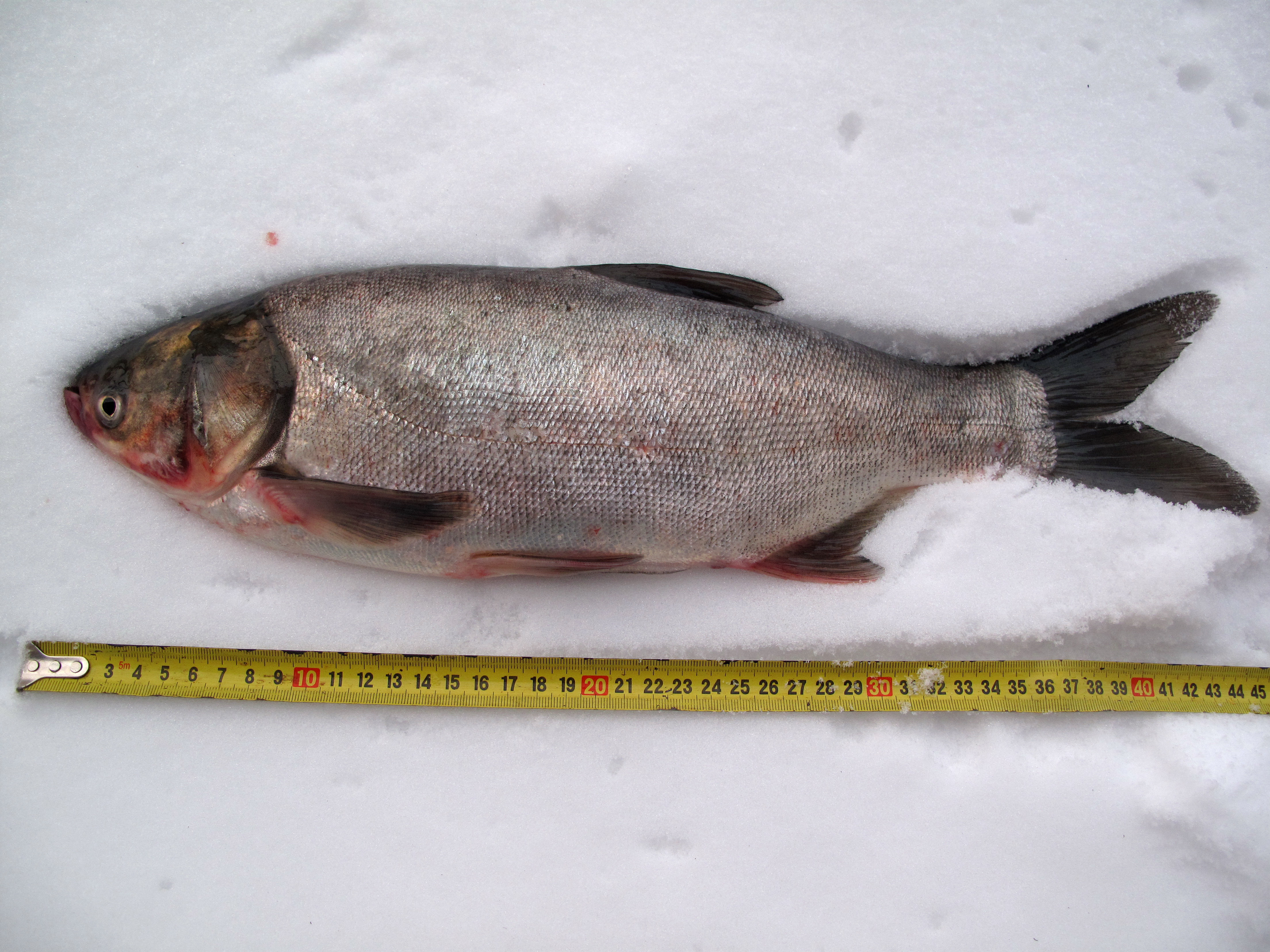 Tolstolobik bílý, délka 44,5 cm, váha 1,08 kg